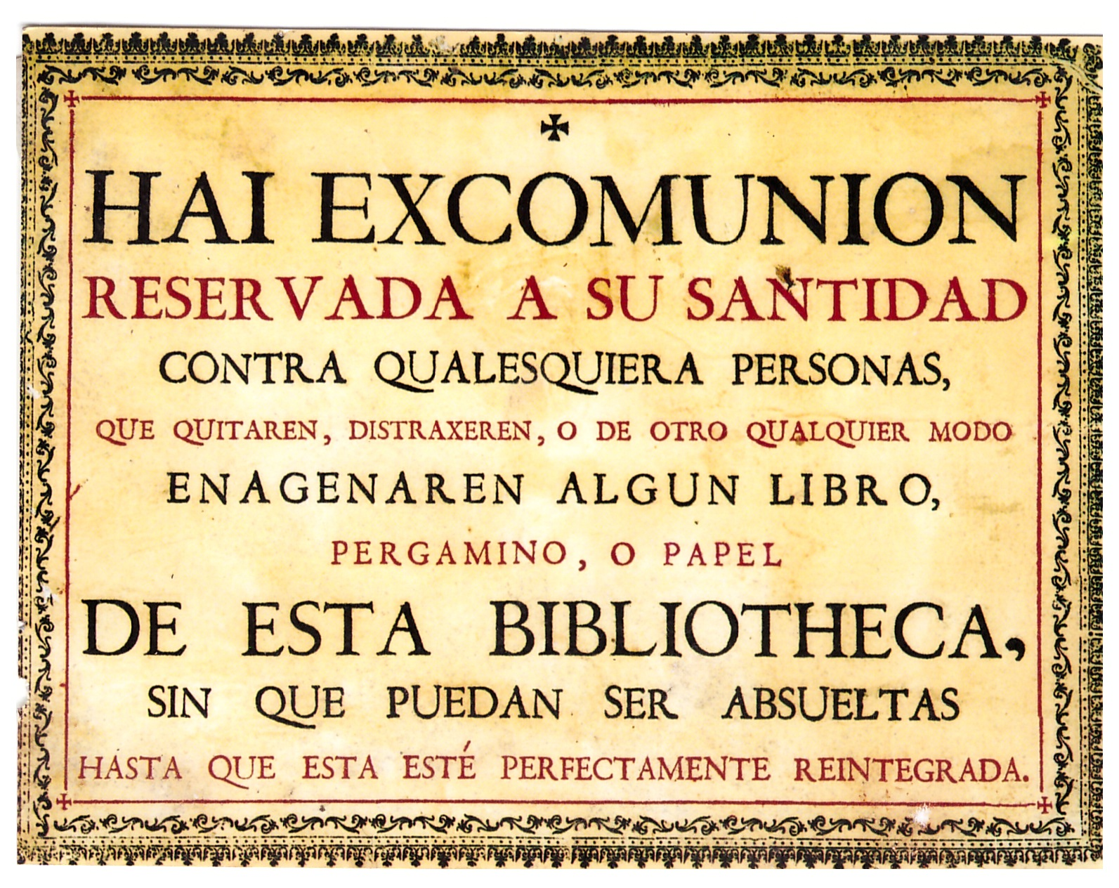 Cédula bibliotecaria de una Bula de Pío V que prohibía el robo o enajenación de libros de las bibliotecas monásticas y conventuales. El texto completo es: HAI EXCOMUNION RESERVADA A SU SANTIDAD CONTRA QUALESQUIERA PERSONAS, QUE QUITAREN, DISTRAXEREN, O DE OTRO CUALQUIER MODO ENAGENAREN ALGUN LIBRO, PERGAMINO, O PAPEL DE ESTA BIBLIOTHECA, SIN QUE PUEDAN SER ABSUELTAS HASTA QUE ESTA ESTÉ PERFECTAMENTE REINTEGRADA